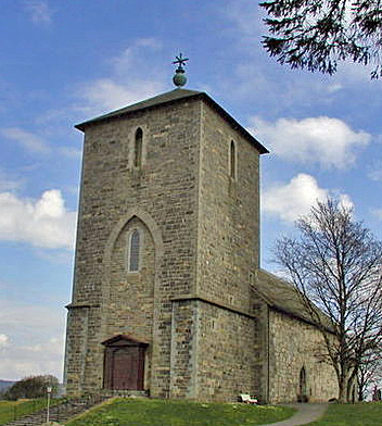 Avaldsneskirken